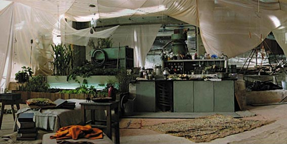 set design for Ainoa - props, dressed set.